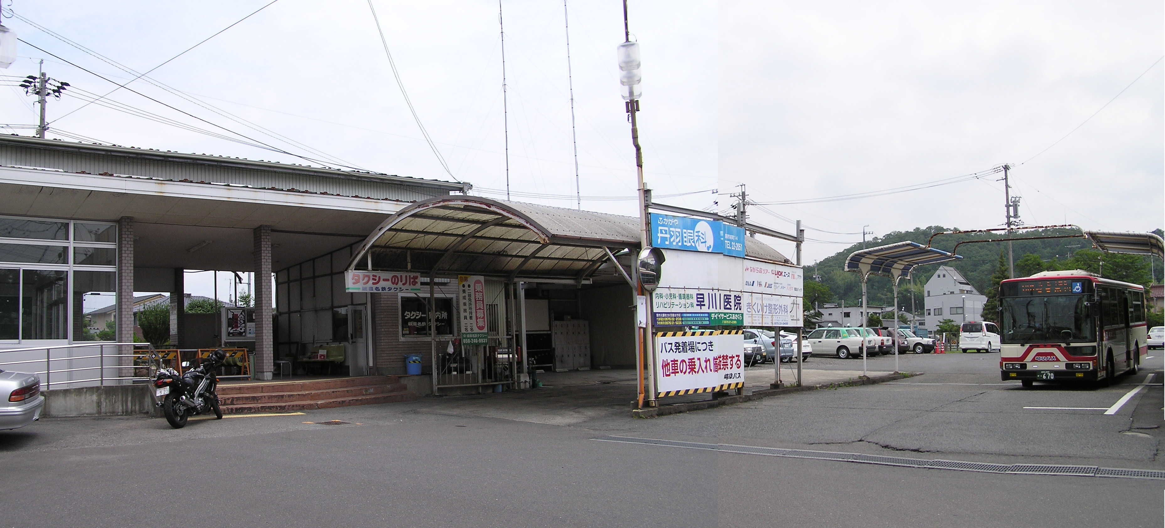 岐阜バス栄町一丁目停留所（旧名鉄美濃町線新関駅）。パノラマ合成。